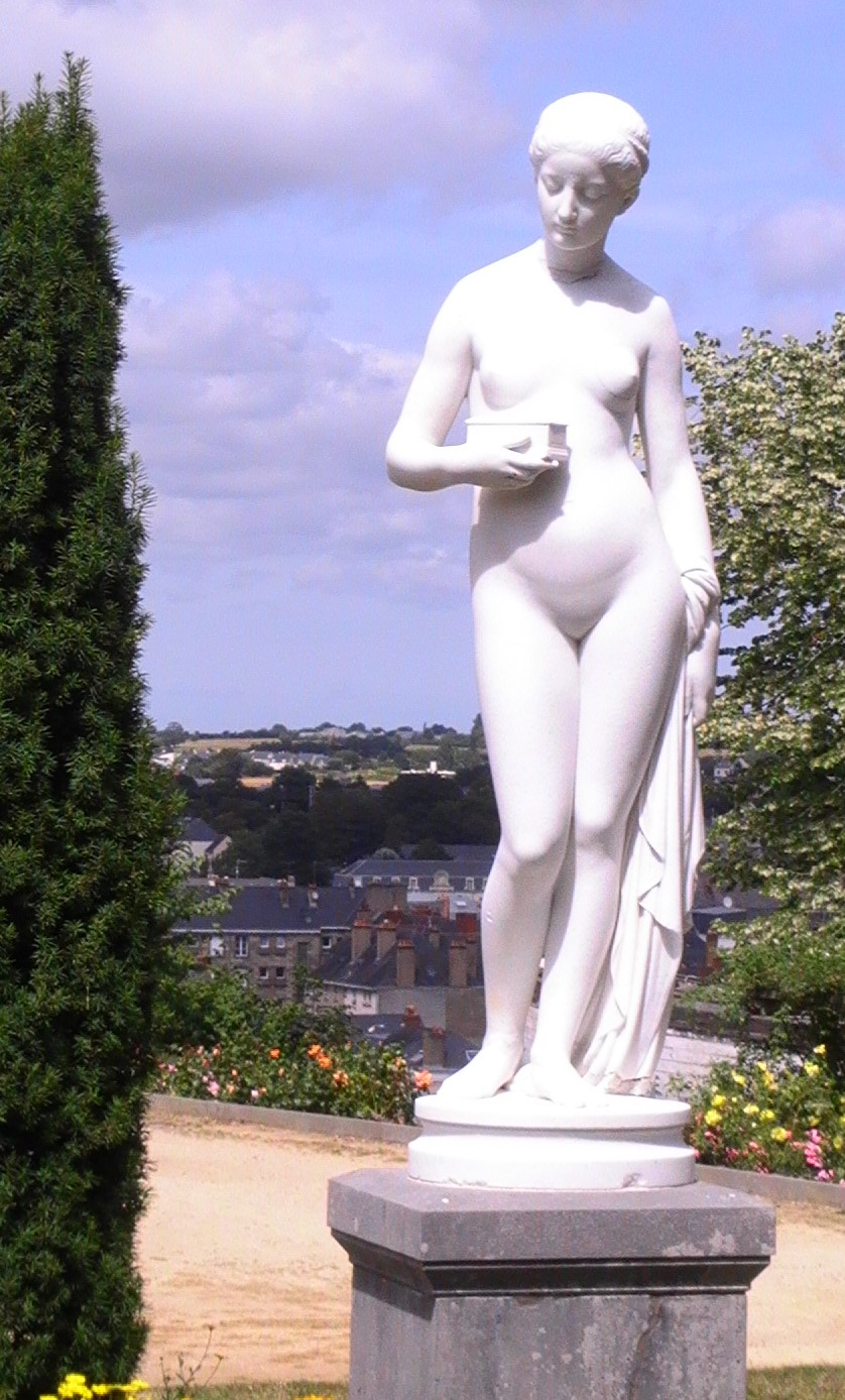 Jardin de La Perrine - 2016 - Laval - Hubert Lavigne 1870